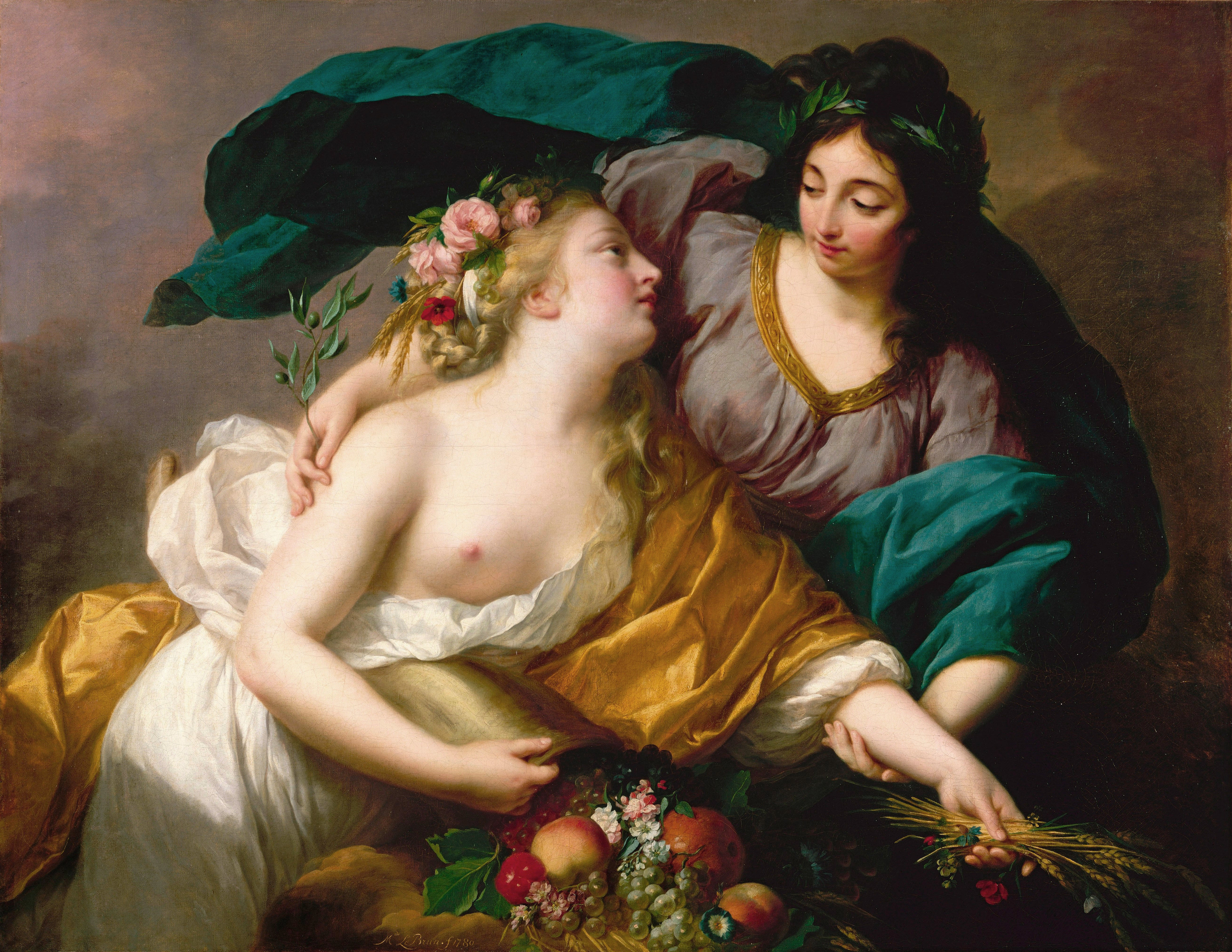 La paix ramenant l'abondance. Élisabeth Louise Vigée Le Brun. Femme. Paris, 1755 - Paris, 1842. Source : Paris, Musée du Louvre, Département des Peintures. Allégorie de l'Abondance le sein découvert, vue de profil, qui tient de la main droite une corne d'abondance, de la gauche des épis et des fleurs des champs. Derrière elle, la Paix coiffée d'une couronne de laurier, tenant dans la main droite une branche de laurier.